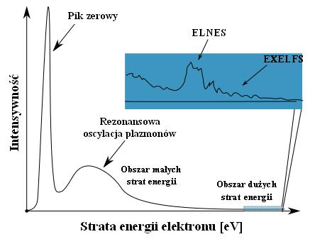 Schemat idealnie wyglądającego widma EELS.